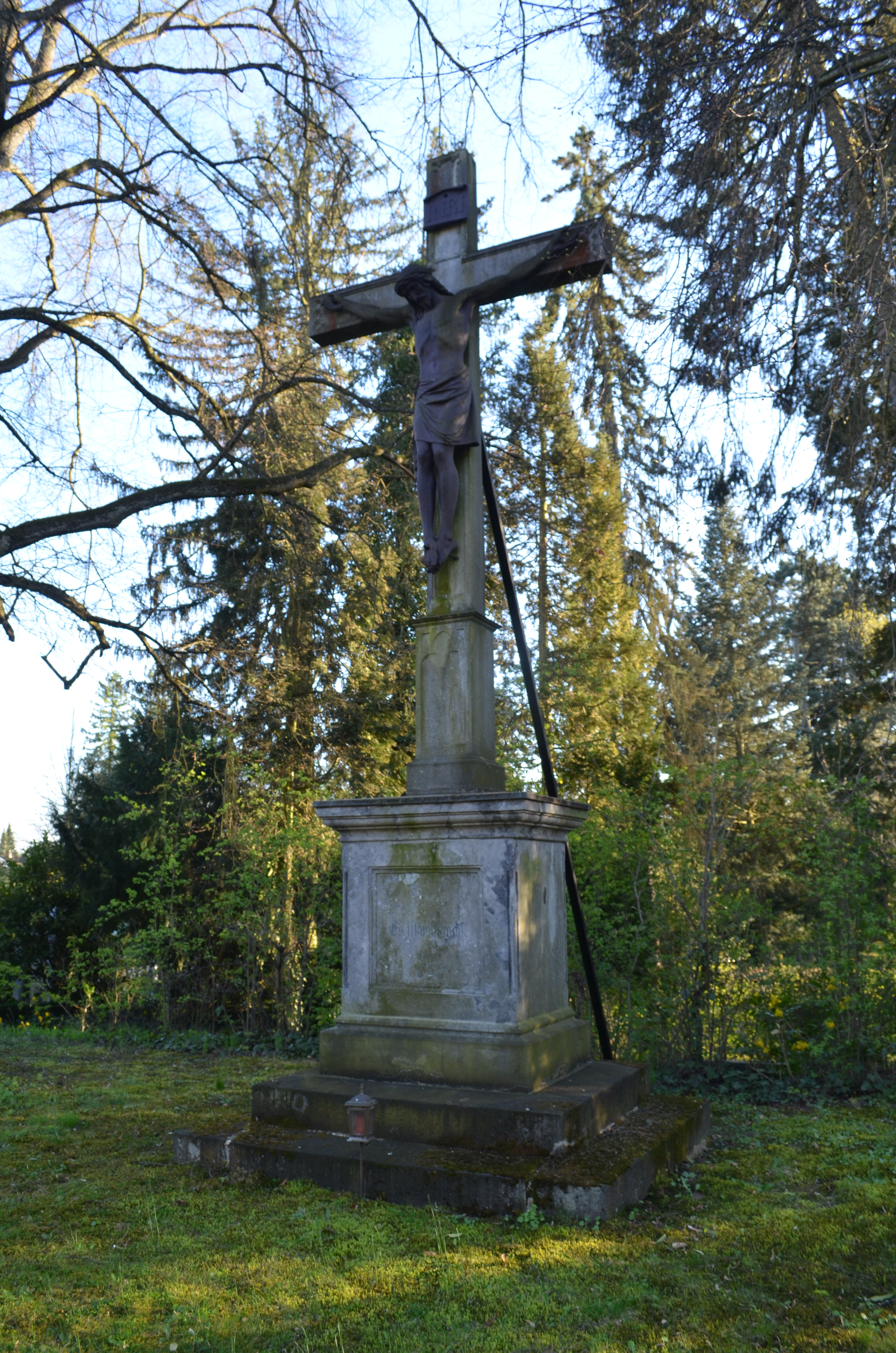 Limburg, Hauptfriedhof, Kreuz